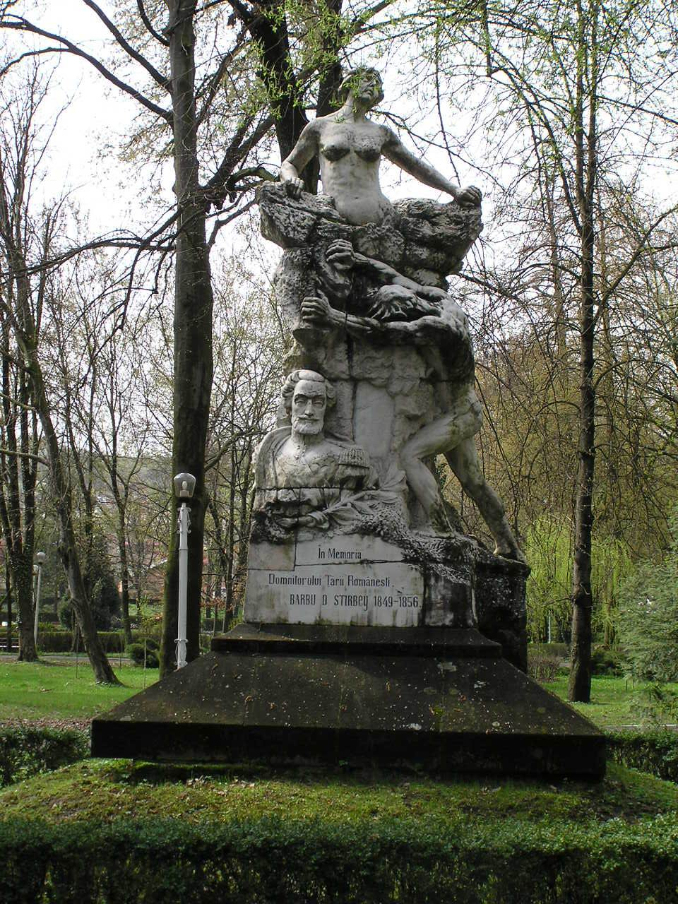 Denkmal an Barbu Dimitrie Ştirbei von Constantin Gh. Mihăilescu, aufgestellt 1920 im Stadtpark „Zăvoi“ von Râmnicu Vâlcea, Rumänien.